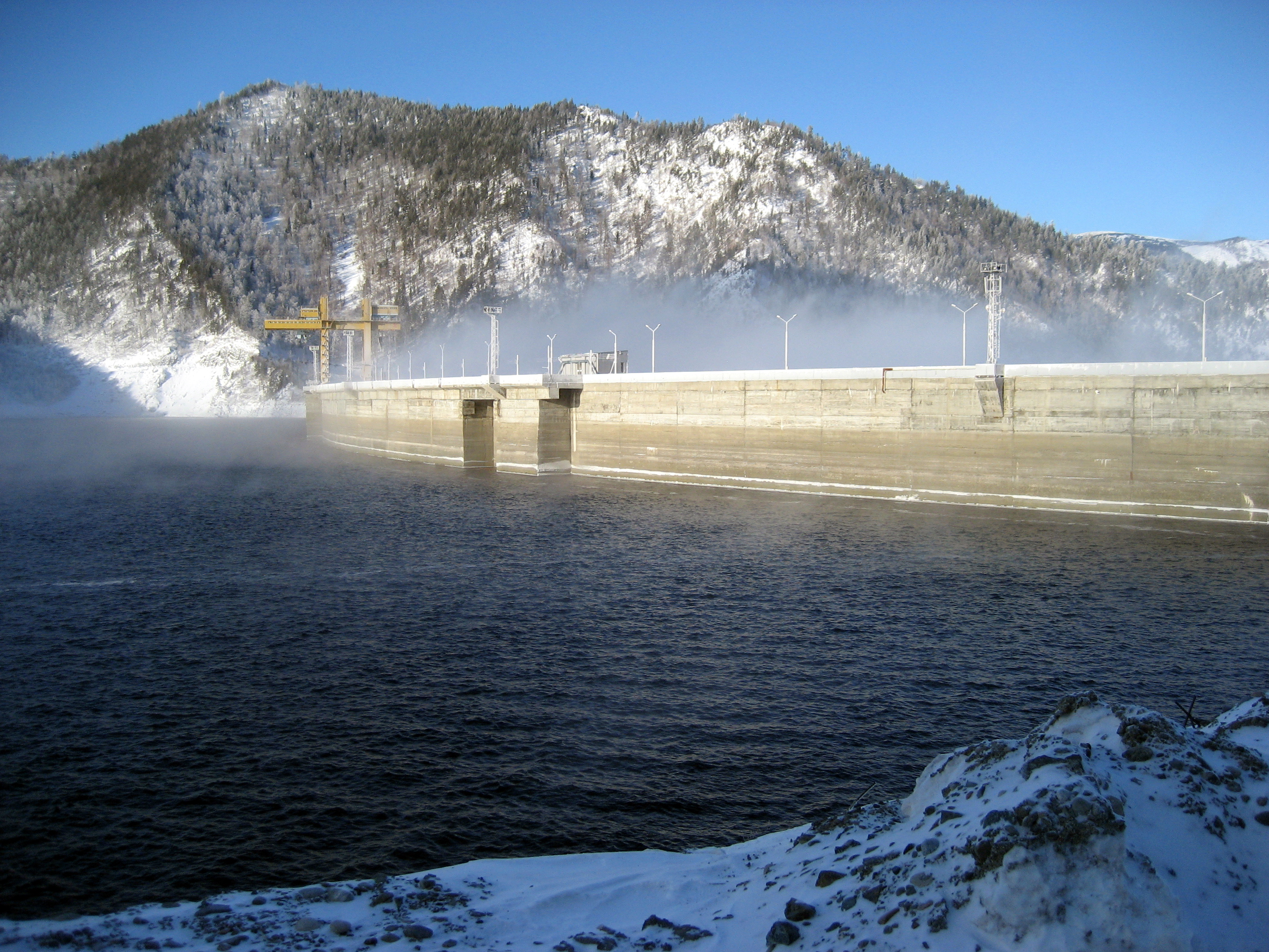 Саяно-Шушенская ГЭС с верхнего бьефа